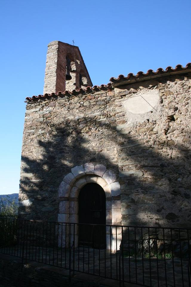 L'église Saint-Etienne de Glorianes